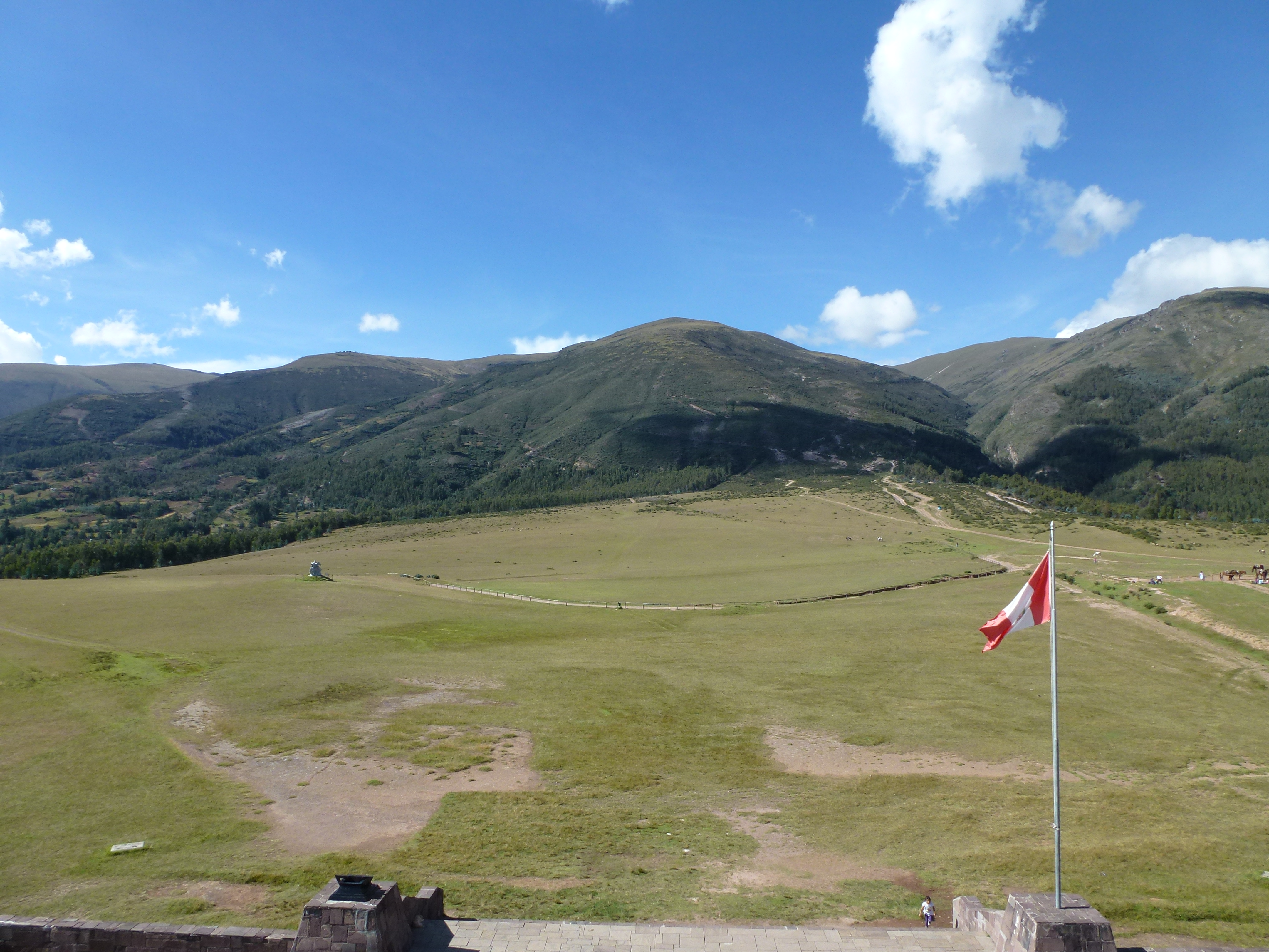 Lugar actual donde se llevo a cabo la Batalla de Ayacucho.